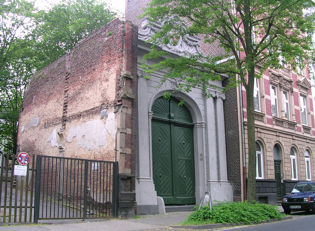 Aachen, Portal der ehemaligen Villa und Tuchfabrik Lochner